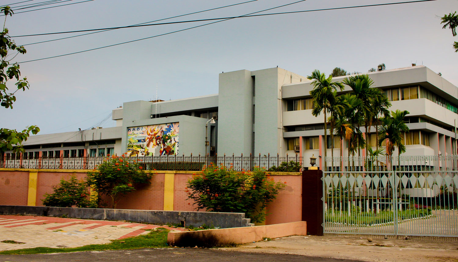 বাংলাদেশ ব্যাংক হচ্ছে বাংলাদেশের কেন্দ্রীয় ব্যাংক। এটি বাংলাদেশ ব্যাংক অধ্যাদেশ, ১৯৭২ এর মাধ্যমে ডিসেম্বর ১৬, ১৯৭১ খ্রিস্টাব্দে প্রতিষ্ঠা লাভ করে।